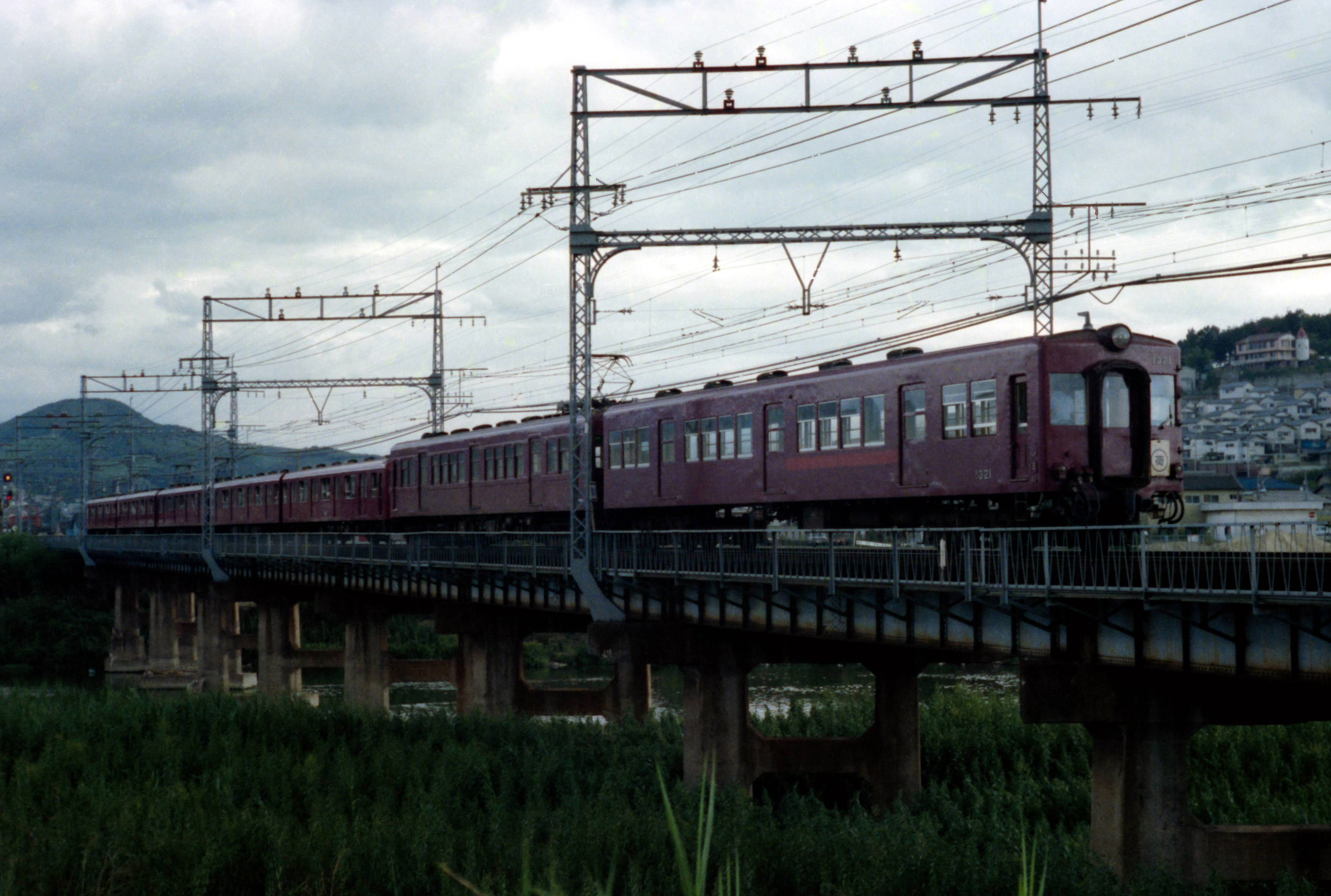 近鉄 旧型１３２１ 荷物電車